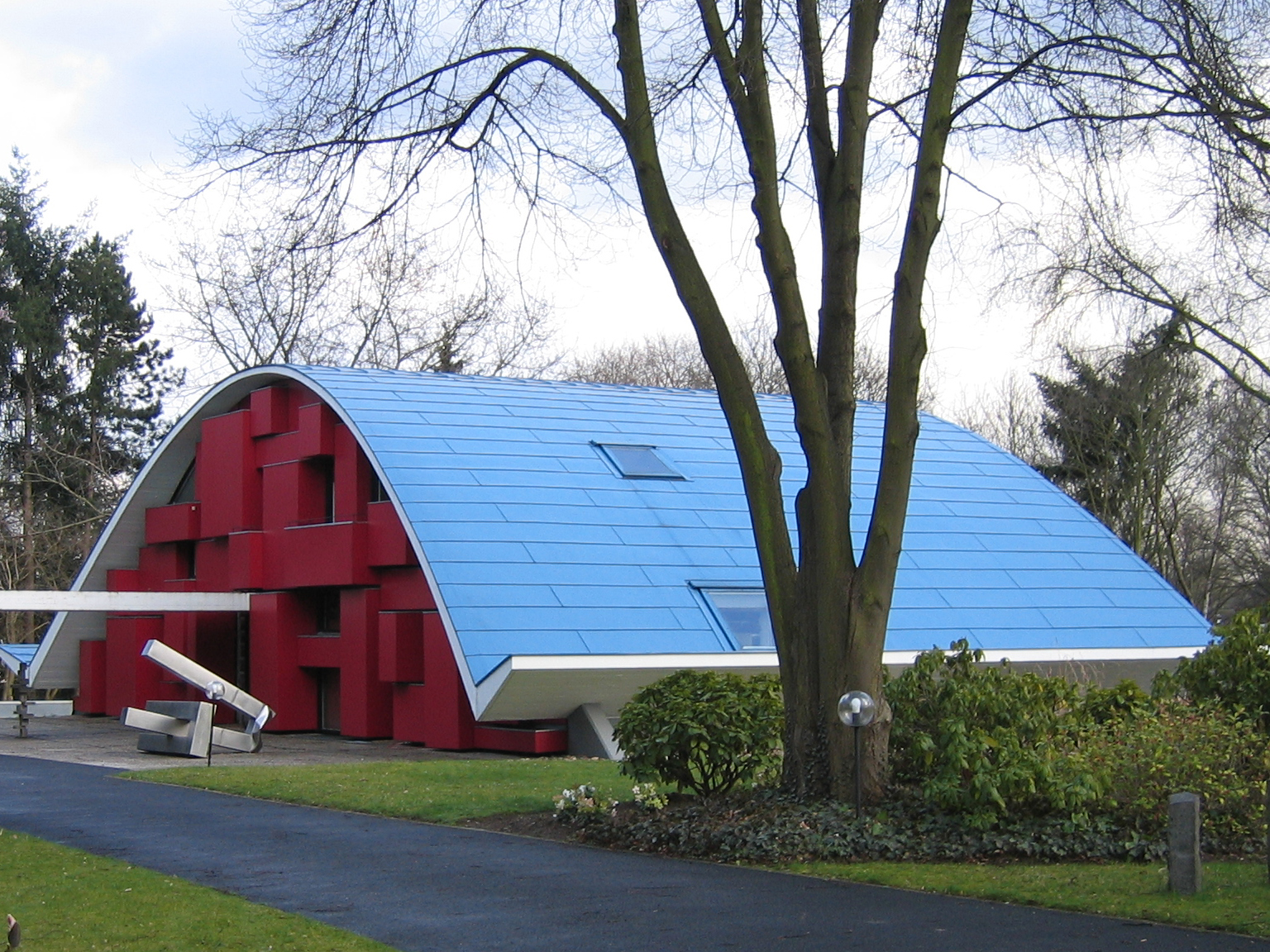 Haus X1 in Köln-Hahnwald This is a photograph of an architectural monument.